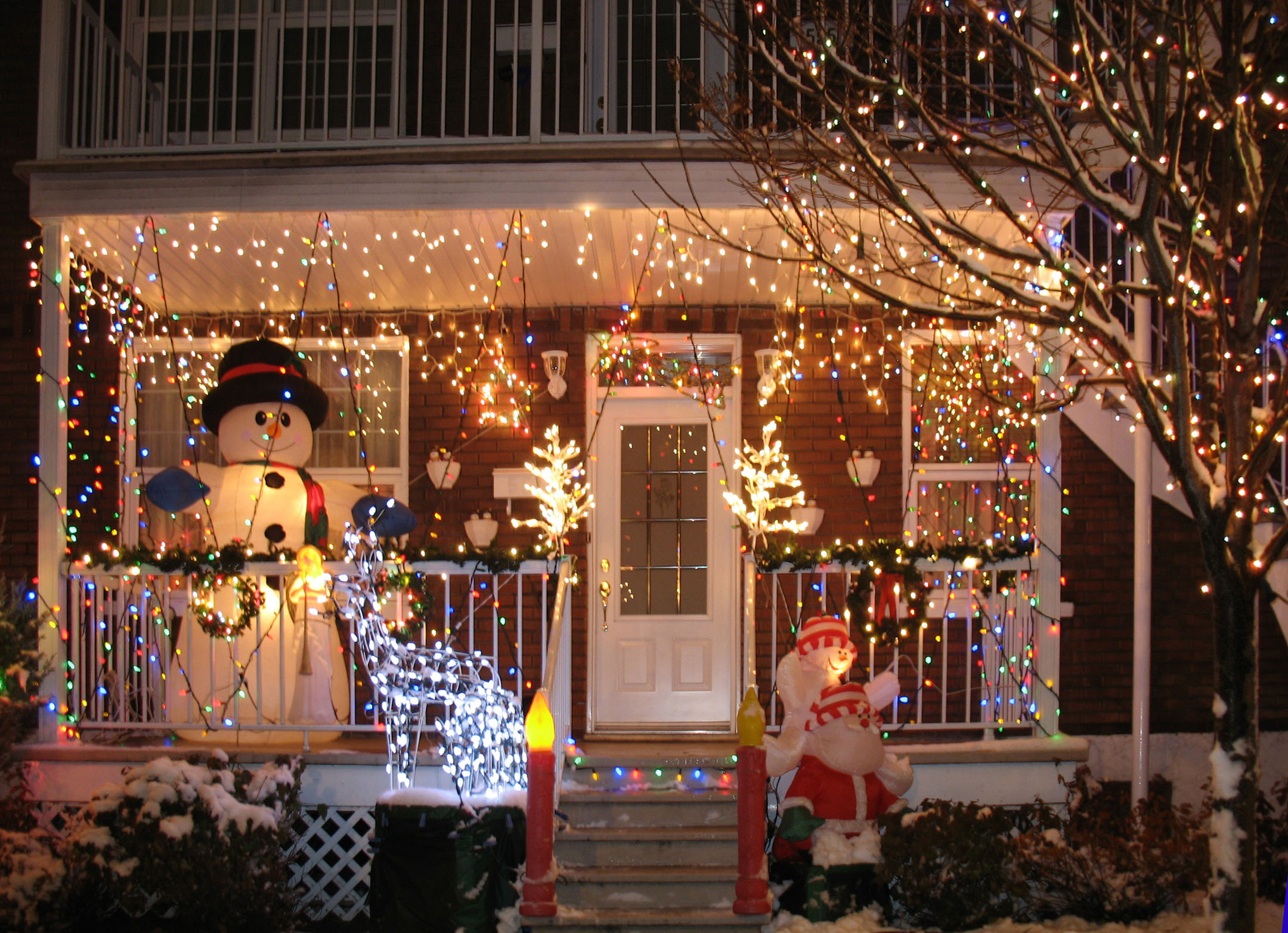 Titre : Noël à Limoilou, rue : 1re Rue, ville : Québec, province : Québec, pays : Canada, continent : Amérique, planète : Terre